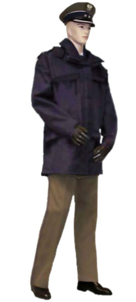 Umundurowanie wyjściowe ABW z kurtką paroporzepuszczalną